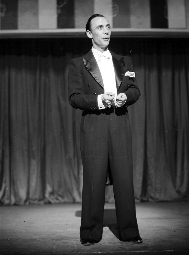 Kabarett der Komiker: Rudolf Platte im Frack